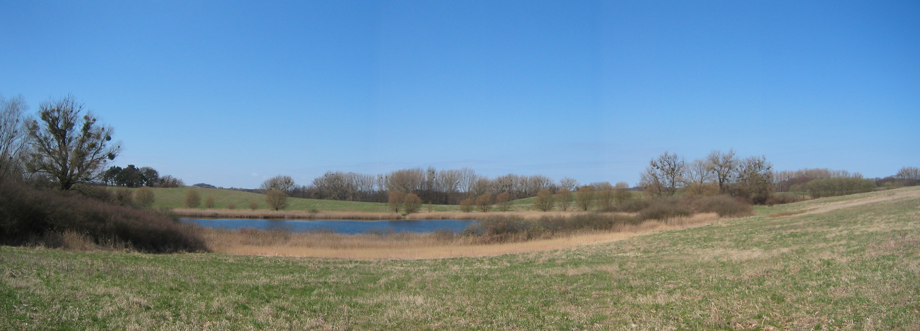 Der Große Triensee bei Melzow (Uckermark)